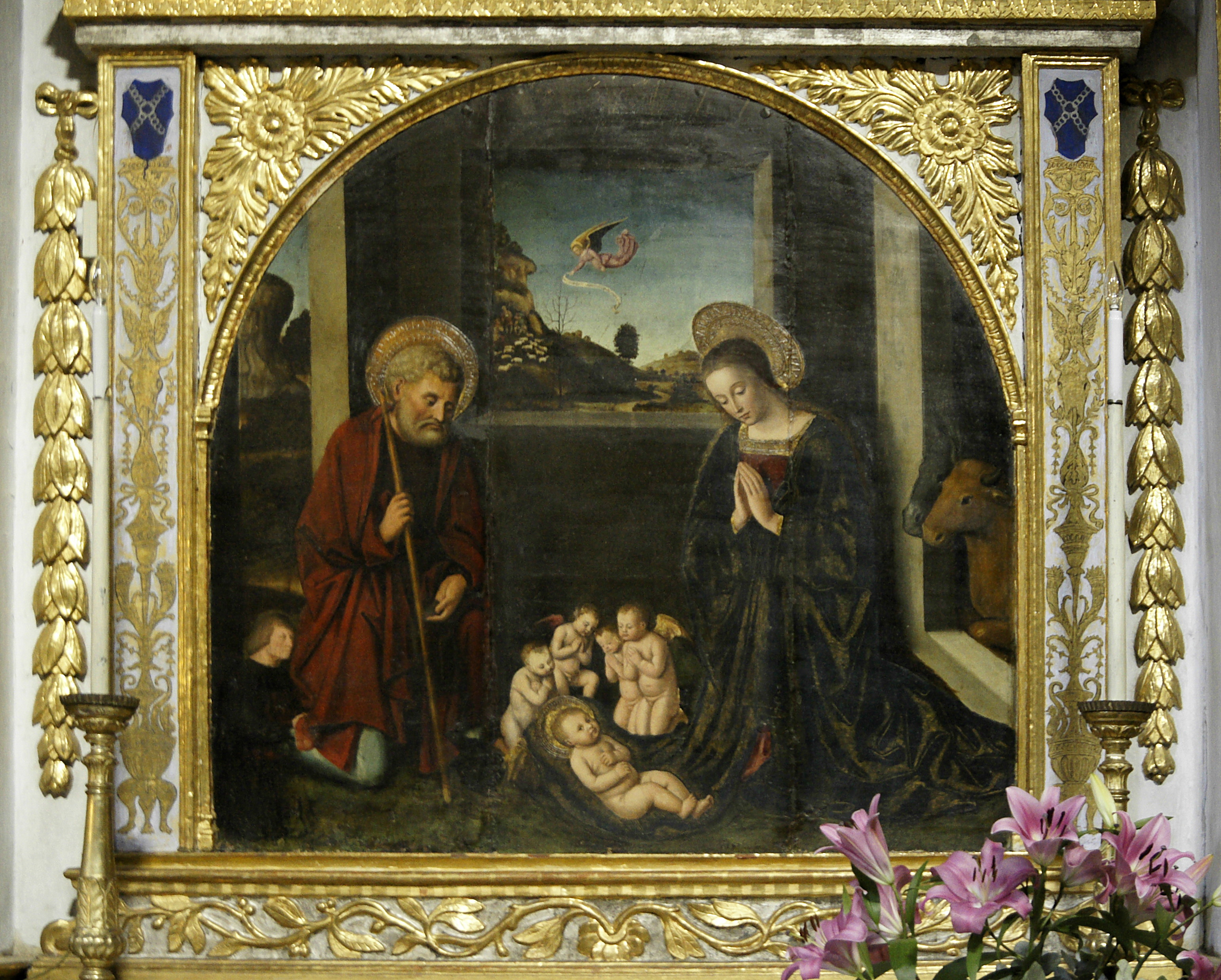 La Brigue (Alpes-Maritimes, France), collégiale St-Martin, retable de la Nativité (vue du panneau principal), attribué à Louis Bréa (1514?); la fiche de la base Palissy lui donne par erreur le titre d'Annonciation.